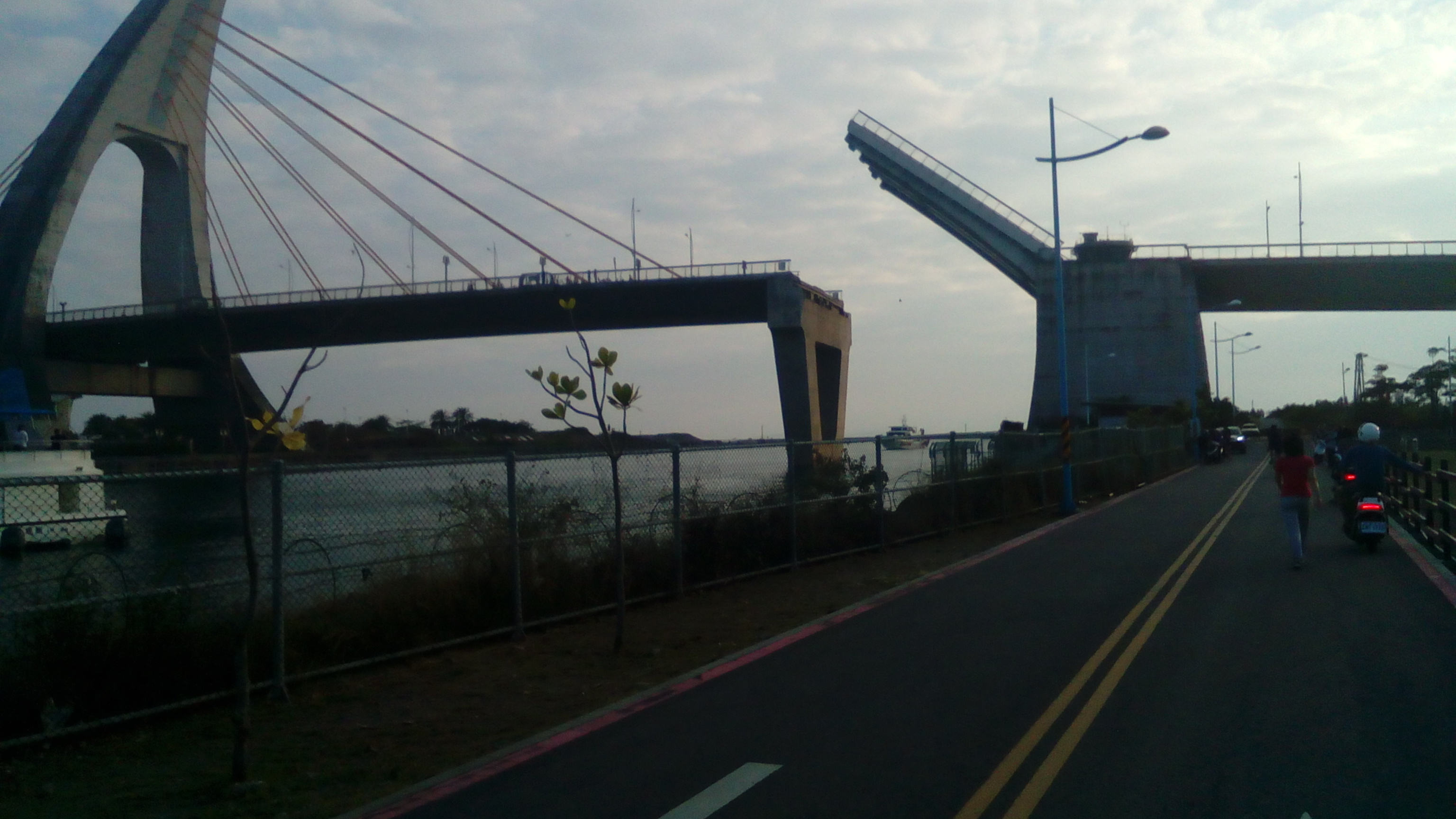 開橋及閉橋各約佔2~3分鐘